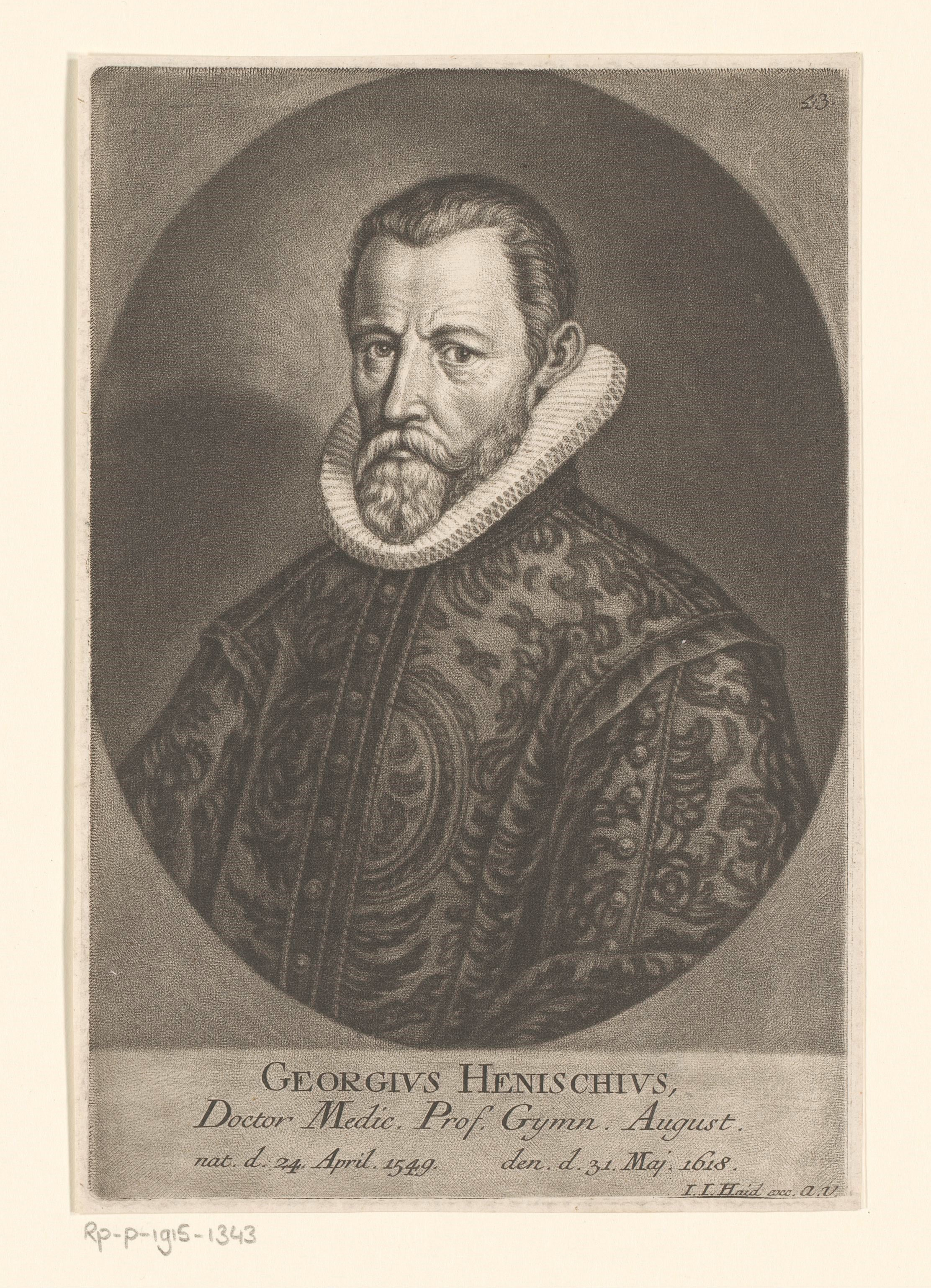 IdentificatieTitel(s): Portret van Georg HenischObjecttype: prent Objectnummer: RP-P-1915-1343Catalogusreferentie: HAB A 9293Opschriften / Merken: verzamelaarsmerk, verso, gestempeld: Lugt 2228VervaardigingVervaardiger: prentmaker: Johann Jacob Haid (mogelijk)Plaats vervaardiging: AugsburgDatering: 1747Materiaal: papier Techniek: mezzotintAfmetingen: plaatrand: h 215 mm × b 144 mmToelichtingPrent gebruikt voor: Brucker, Jacob. Ehrentempel der Deutschen Gelehrsamkeit. Augsburg: Johann Jacob Haid, 1747.OnderwerpWat: historical personsWie: Georg HenischVerwerving en rechtenVerwerving: aankoop 1905Copyright: Publiek domein